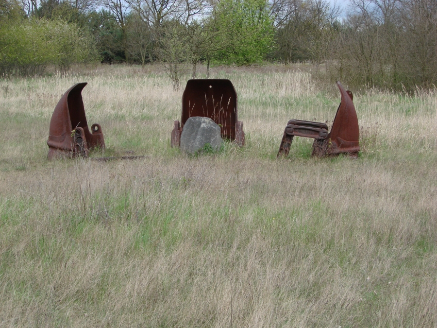 Kunstprojekt auf dem Gebiet des devastierten Ortes Gräbendorf (Gemeinde Reddern).